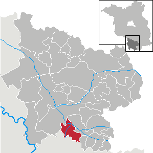 Röderland in Brandenburg (Country) - District Elbe-Elster